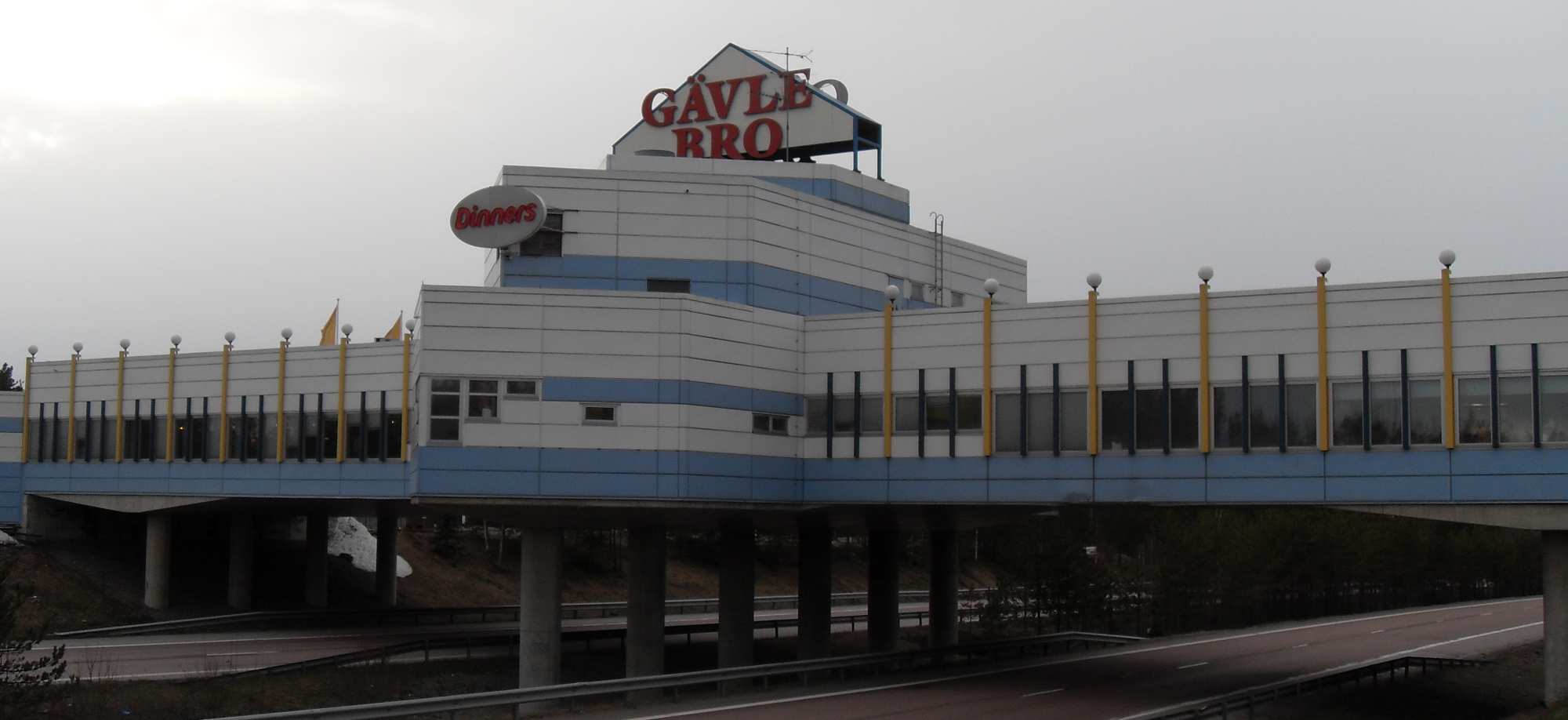 Gävle Bro